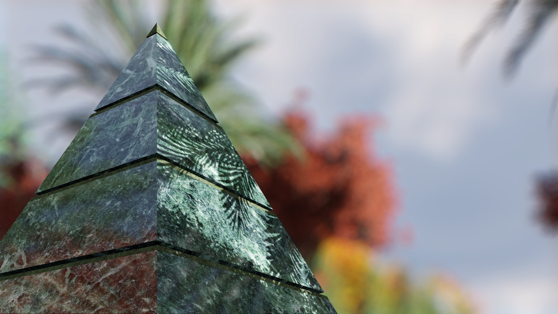 Escultura "Piràmide" Parc Can Sabate - D.Navas, N.Solé. I.Jansana - Ajuntament de Barcelona